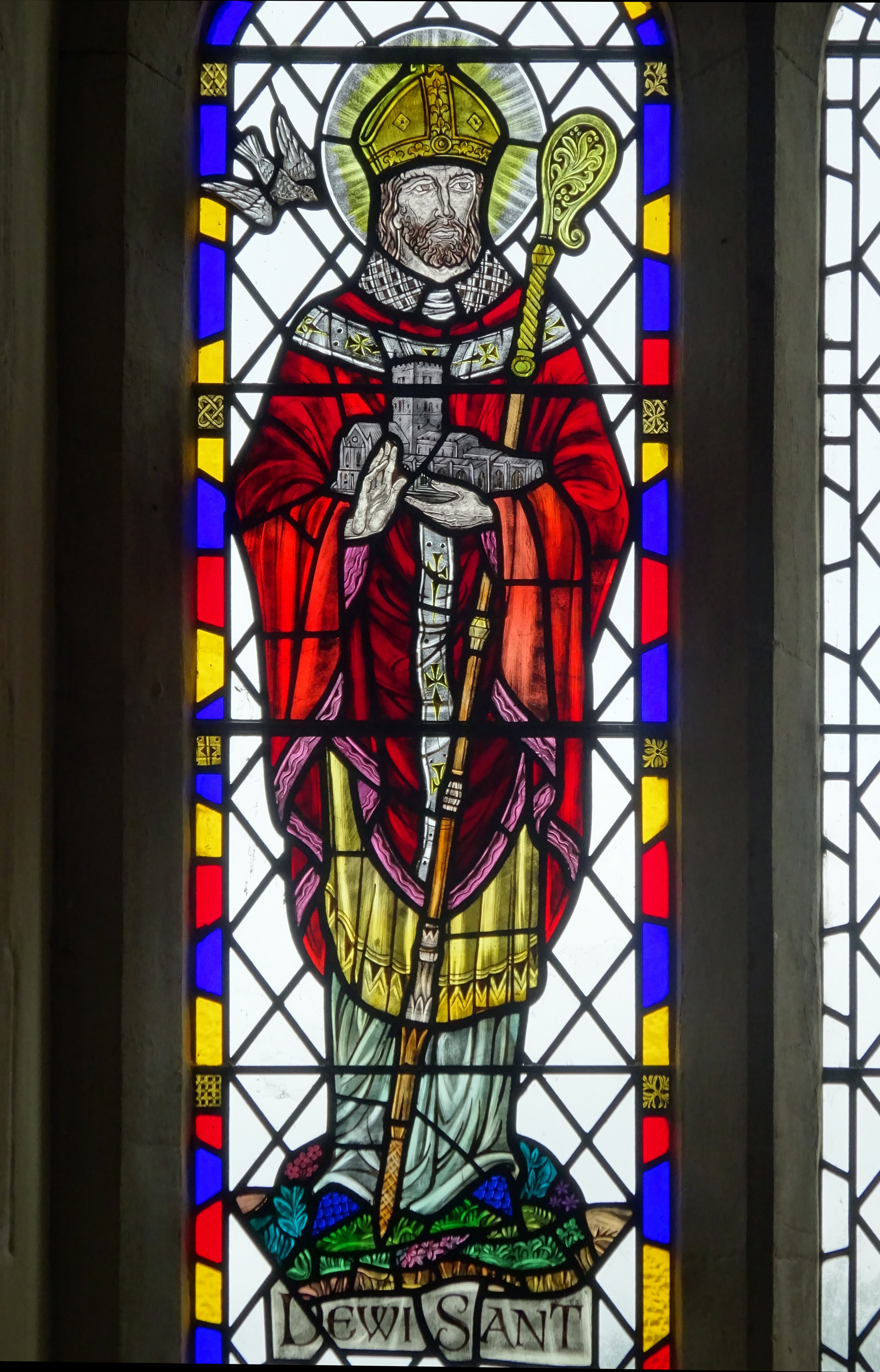 Eglwys Dewi Sant, Blaenporth, Ceredigion.